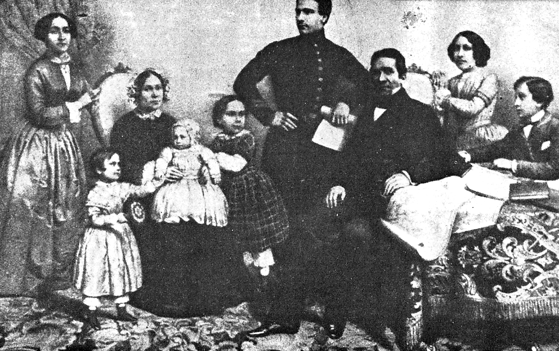 El mariscal Andrés de Santa Cruz (1792-1865), rodeado de su familia, en La Paz, Bolivia.